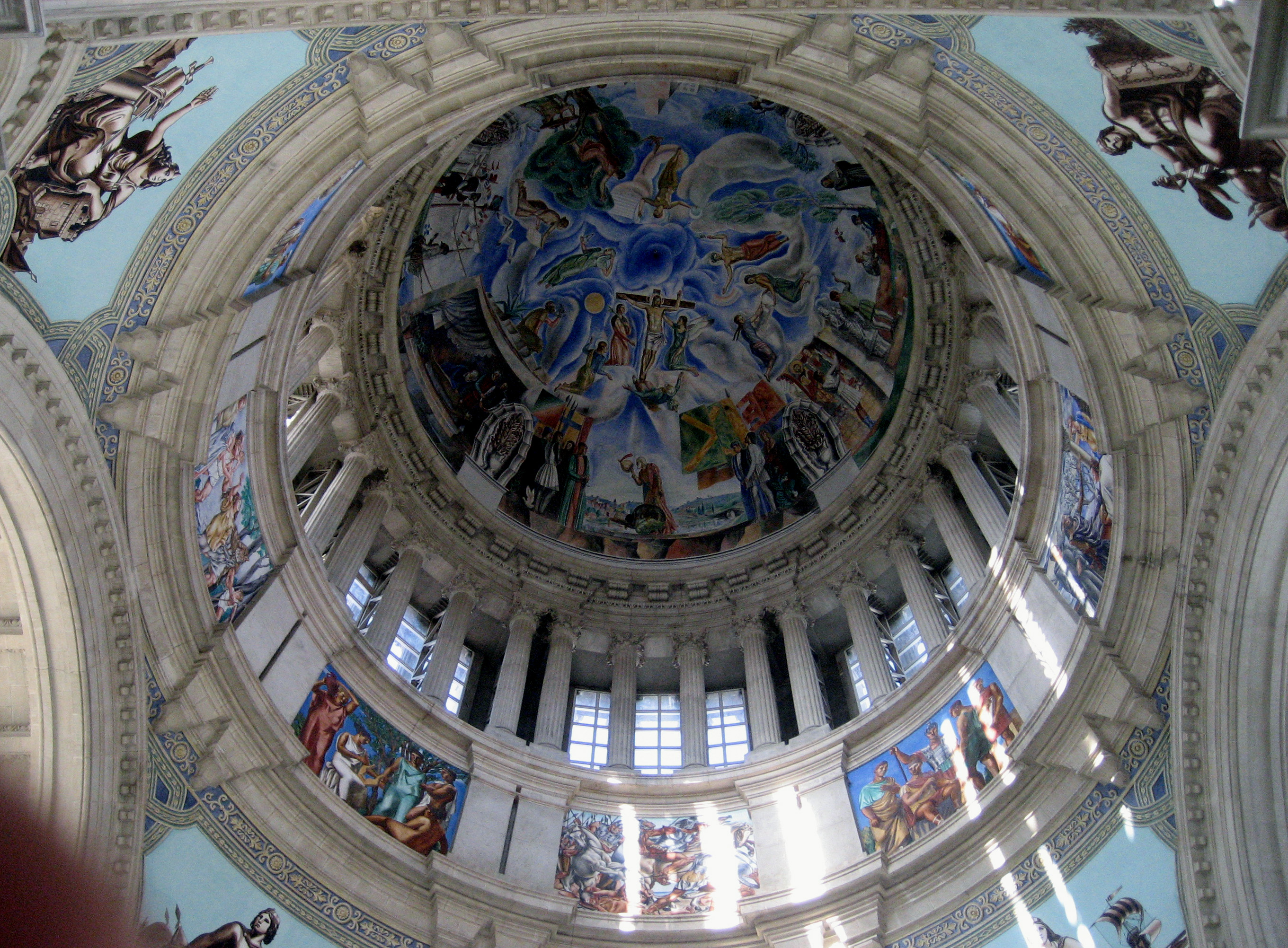 Cúpula mayor del Palacio Nacional de Barcelona, Cataluña. Spain